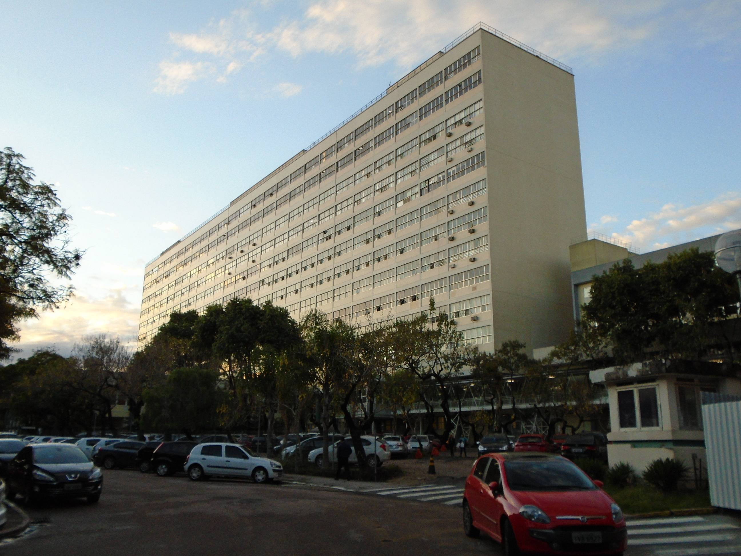 Hospital de Clínicas de Porto Alegre